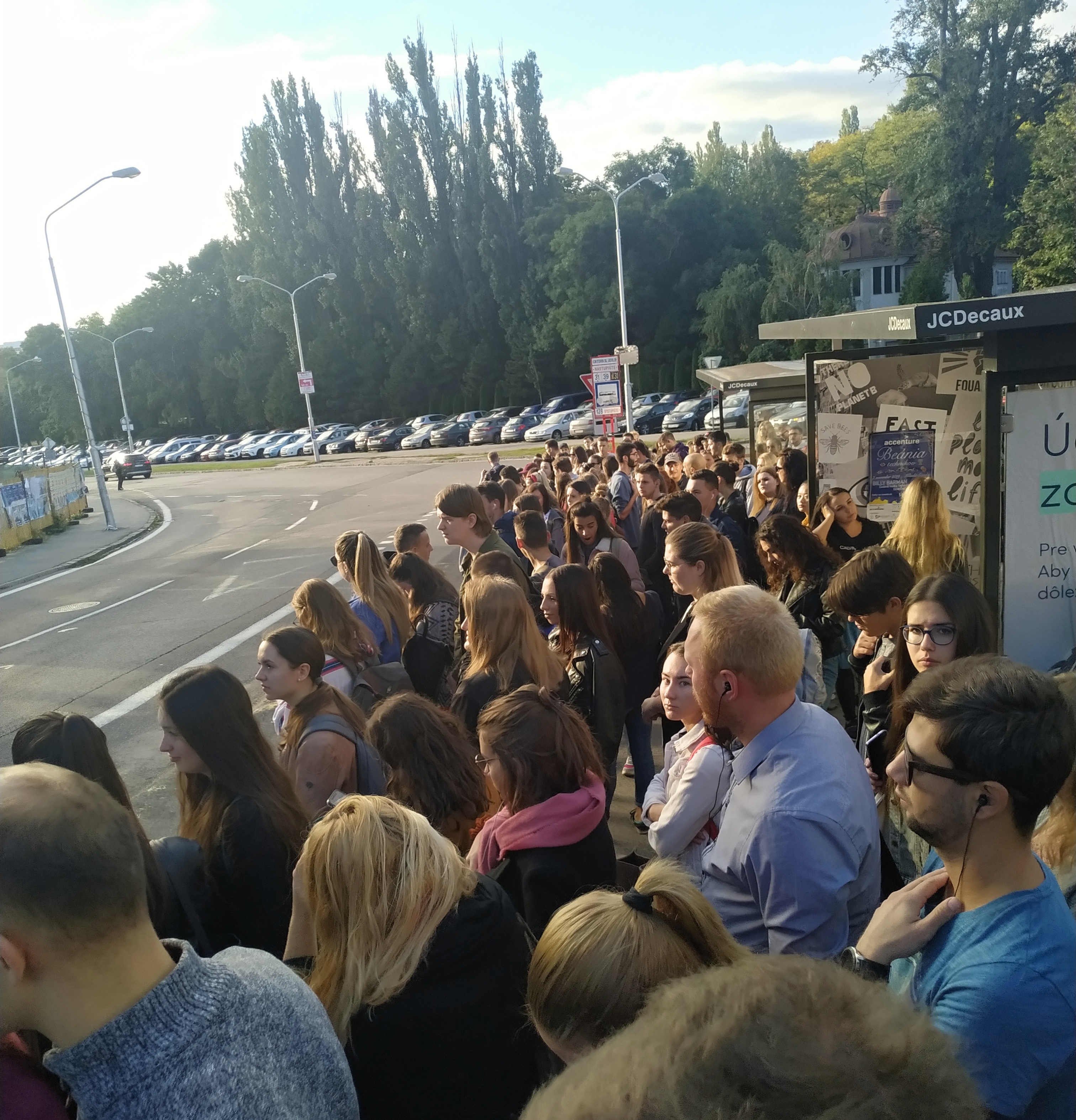 Plnka na zastávke Mlyny